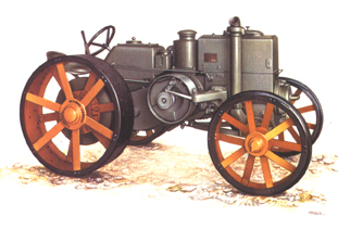 Stefano Bortolamasi, illustrazione di antica trattrice agricola, rappresentazione del Landini 30 hp